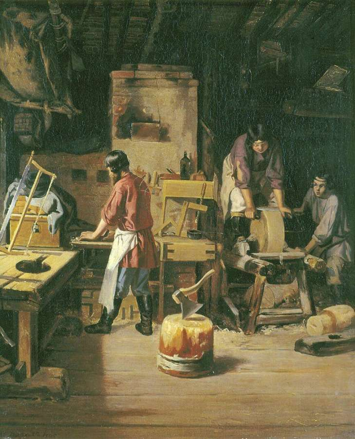 Плахов Лавр Кузьмич. В столярной мастерской. 1845.